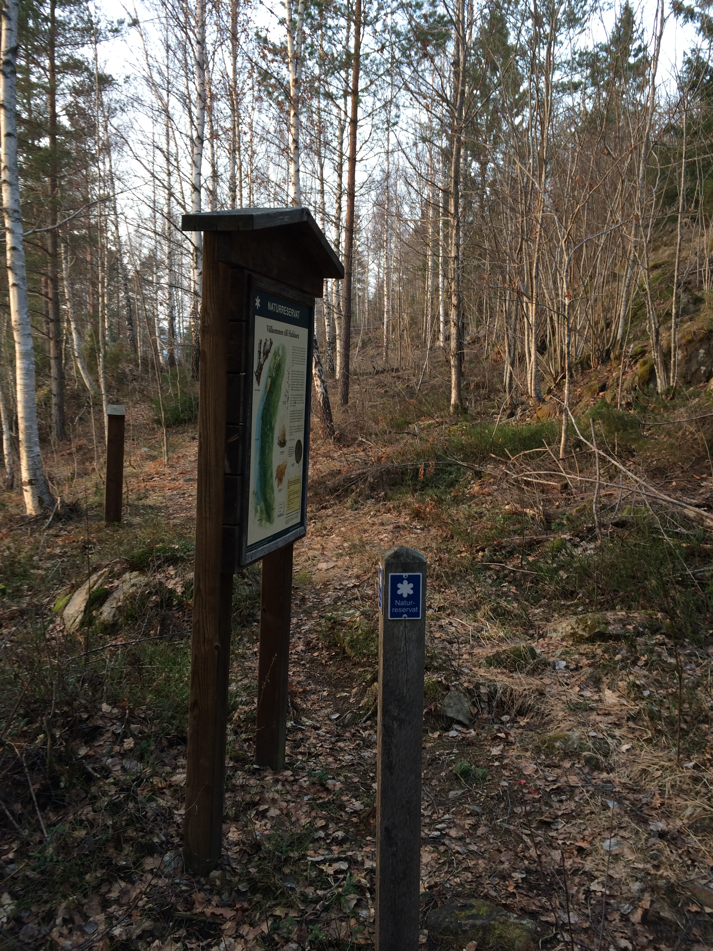 Södra entrén till Hafsåsens naturreservat i Åmåls kommun.